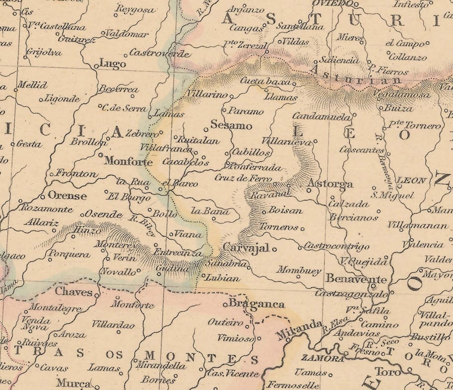 Detalle del área del Bierzo en el mapa "Spain and Portugal", realizado en 1838 por John Betts